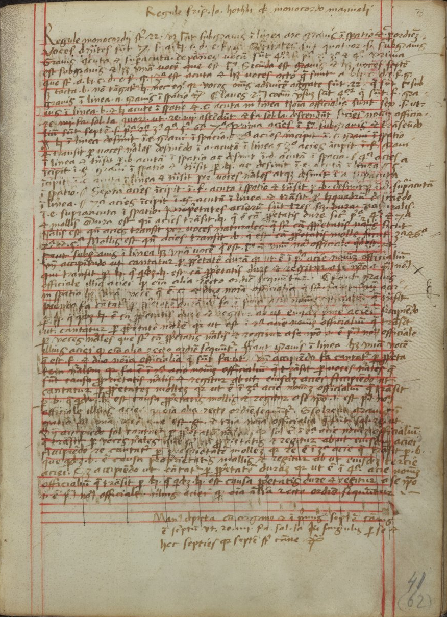 Page du traité de Johannes Bonadies, « Regulae Cantus » (1473). Le palimpseste d'un Kyrie Orbis, une pièce inconnue, a été effacée par Bonadies — Codex Faenza, folio 62r.